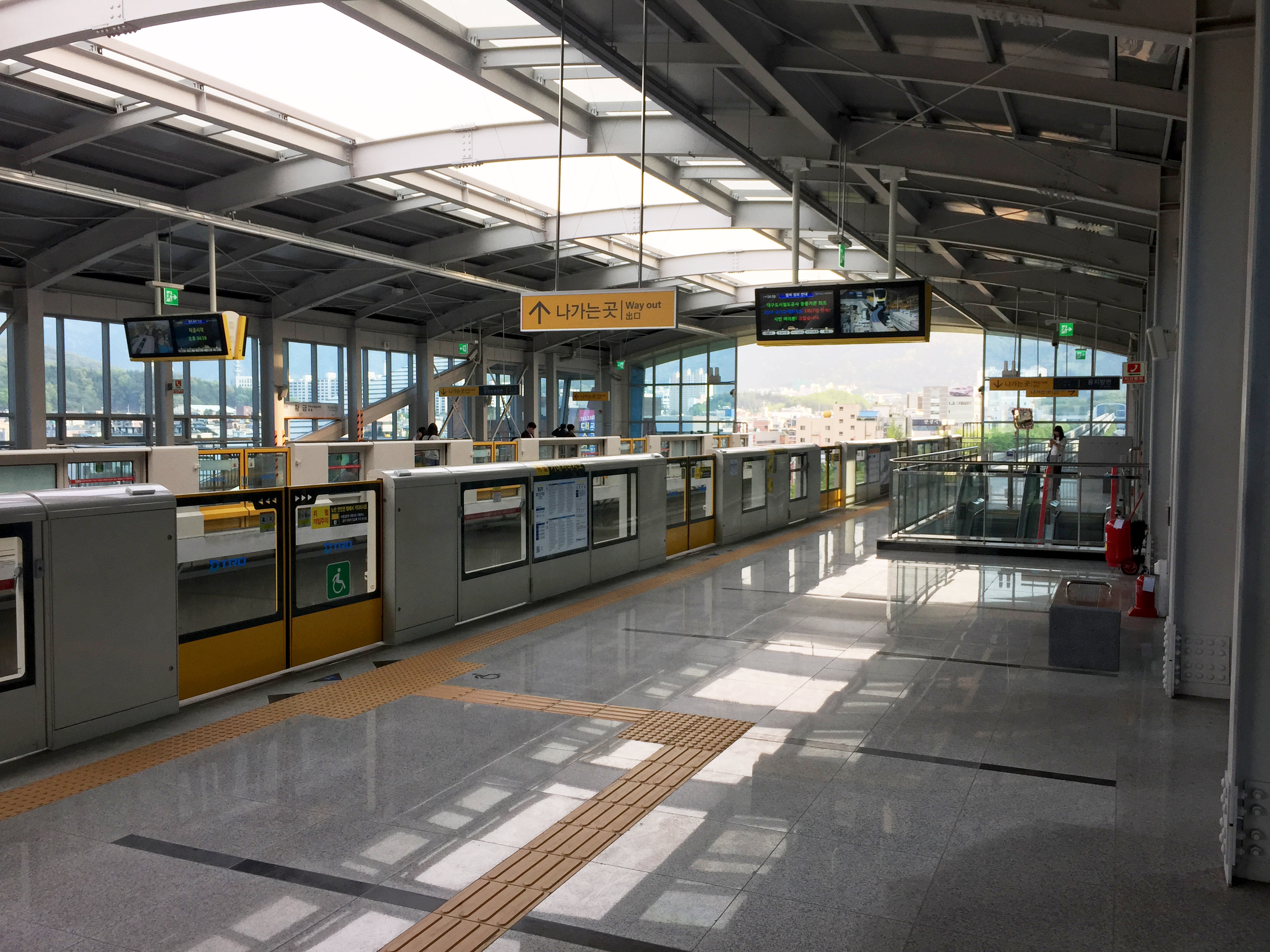 황금역 승강장